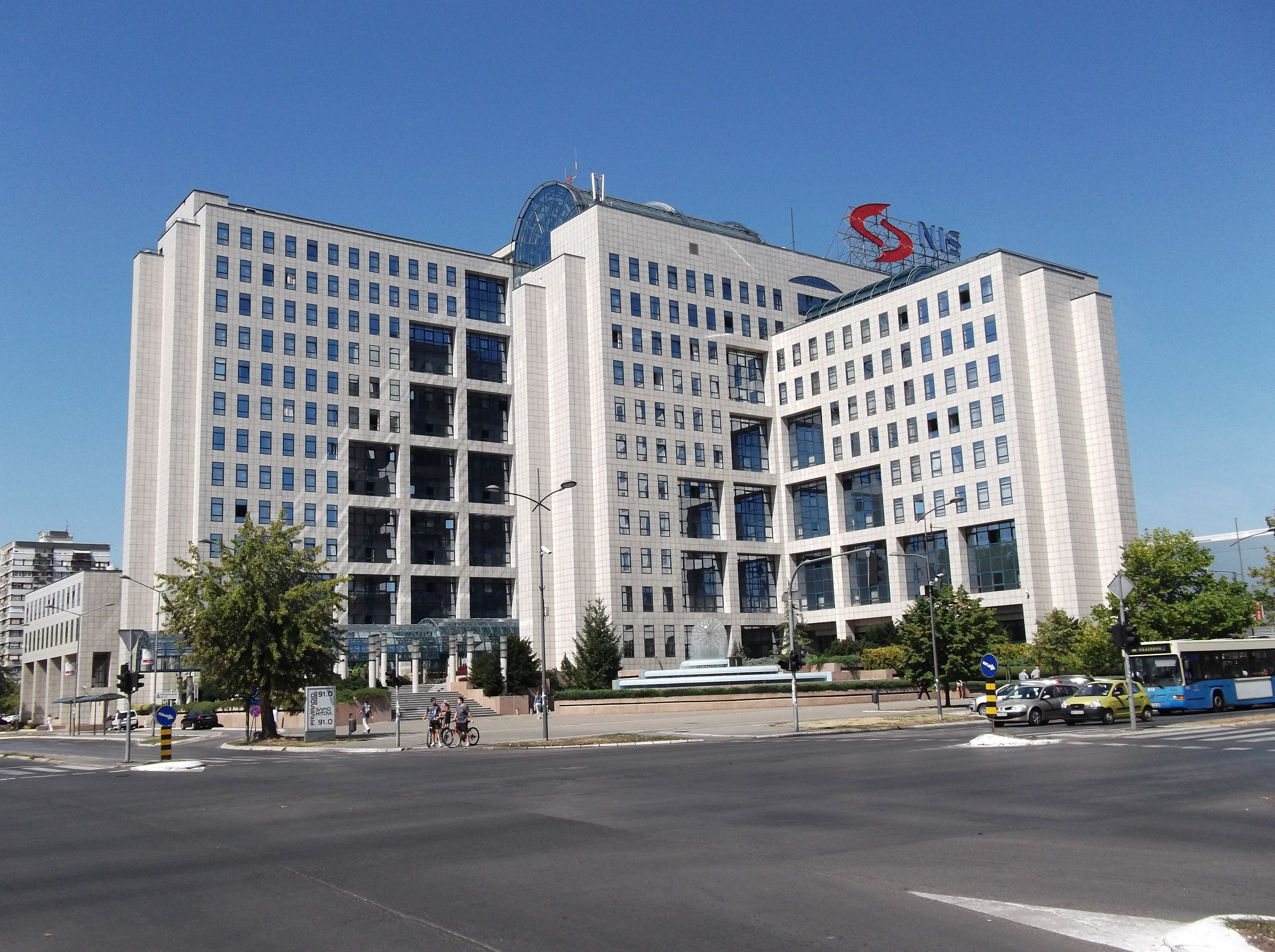 NIS-ova zgrada